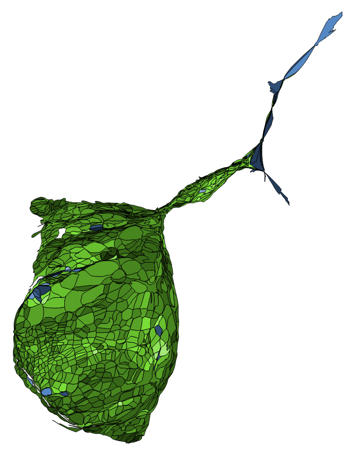 中文（台灣）: 顏色對照表